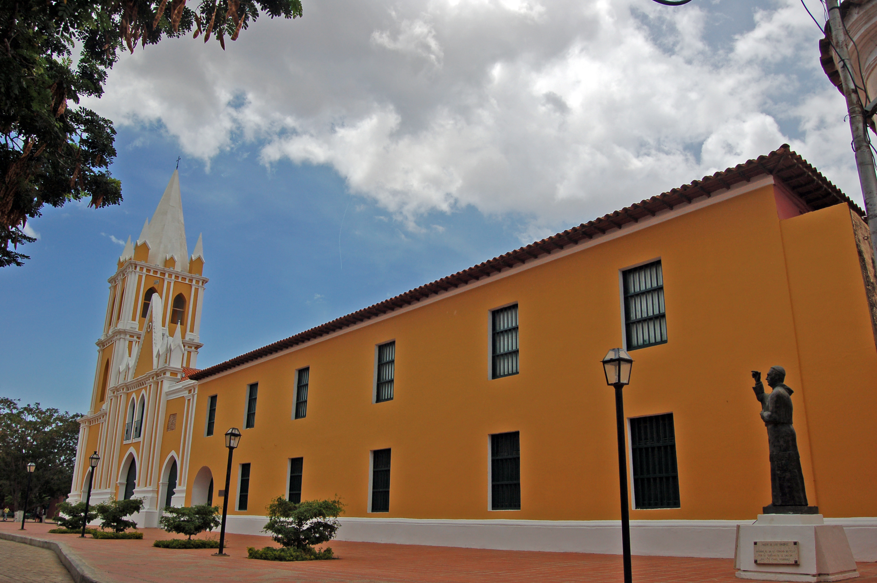 Iglesia de San Francisco de Coro y Casa Campuzano Polanco